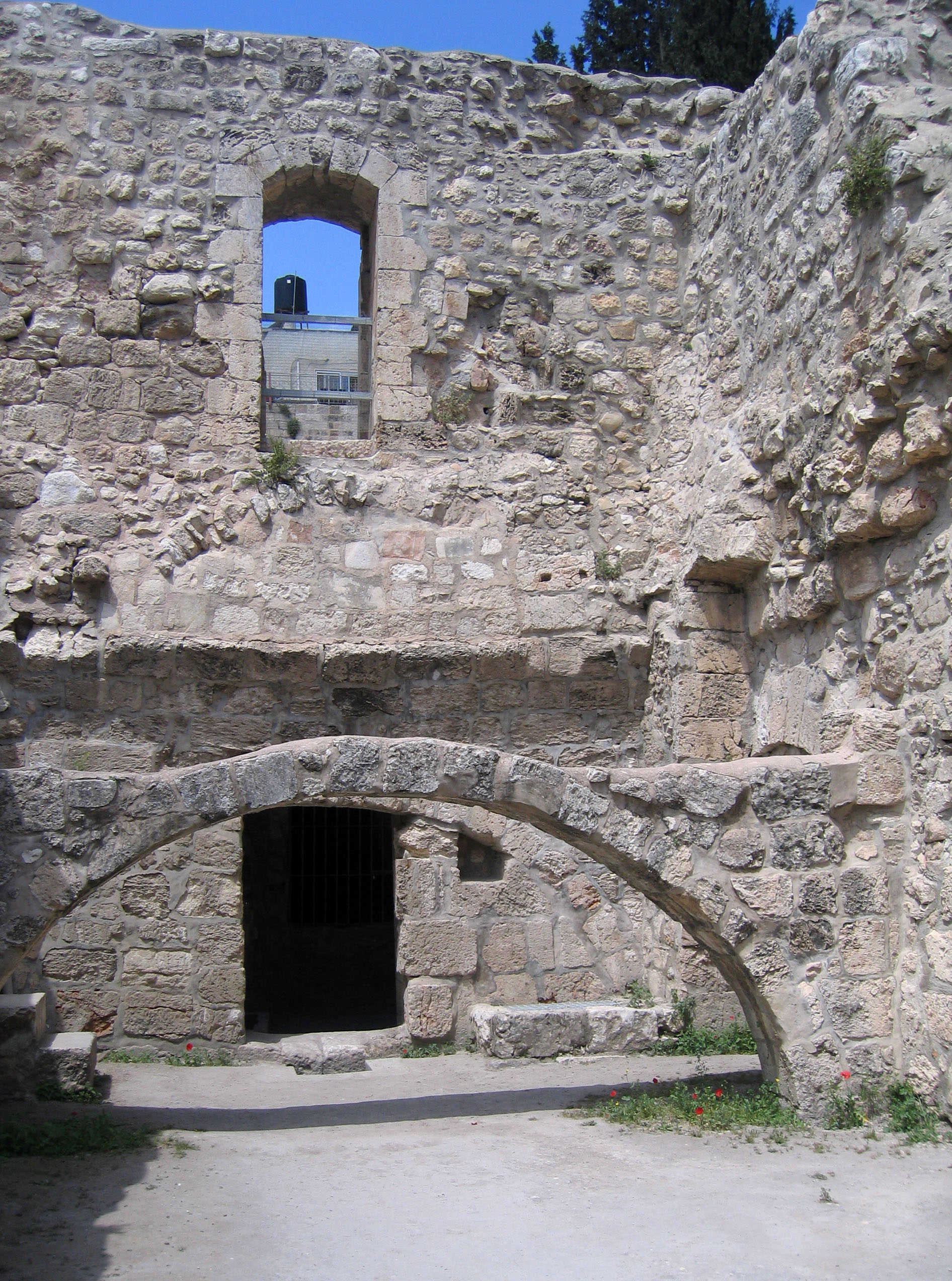 שרידים מן המנזר הצלבני, בית חסדא